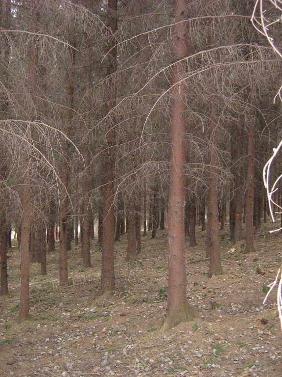 Fichtenmonokultur (stärkeres Stangenholz) am Hangfuß des Rotsteins